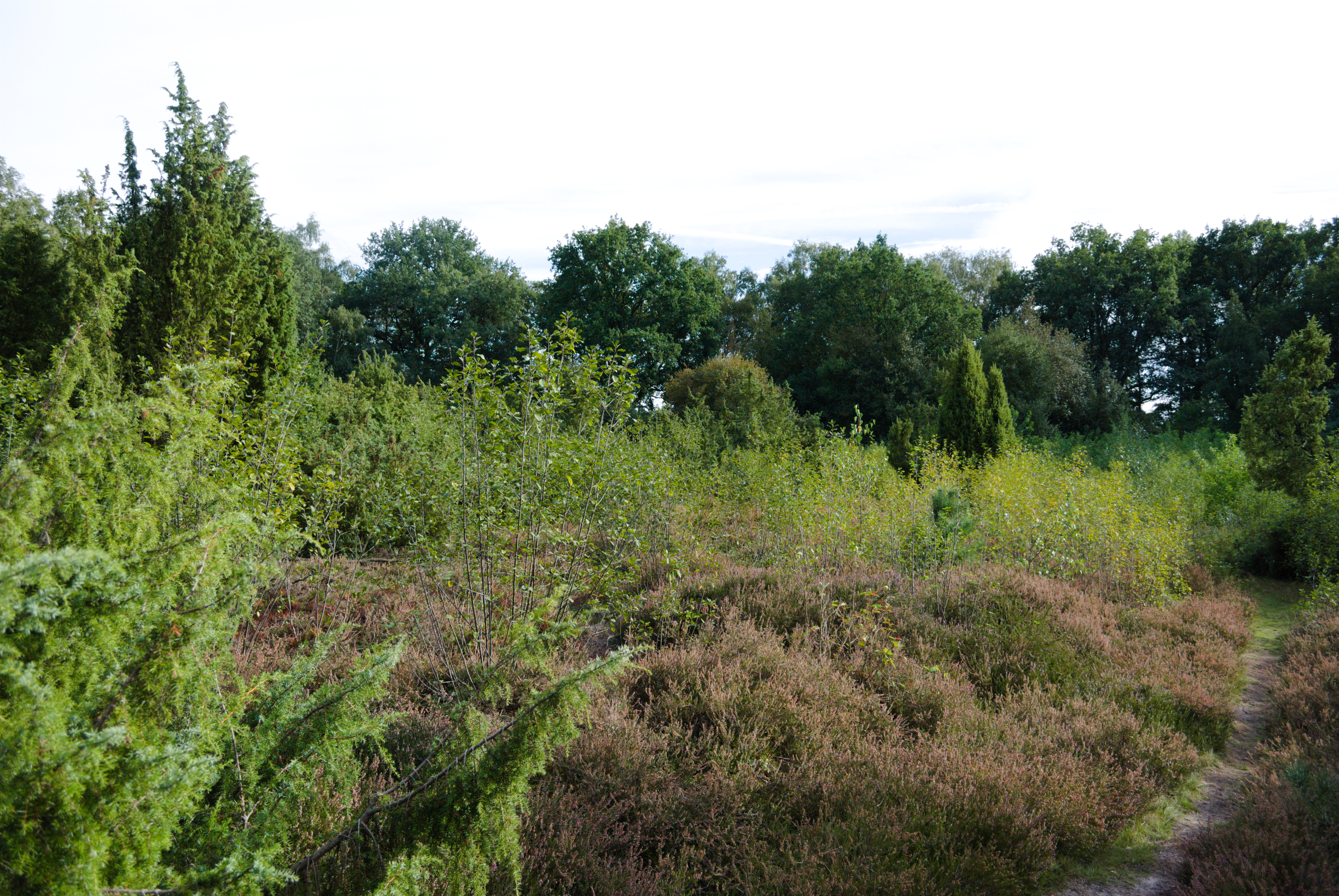 Heidelandschaft in Brünas Heide